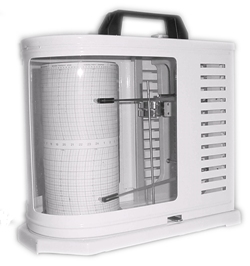 moderno termoigrografo ancora utilizzato nelle stazioni meteorologiche mondiali